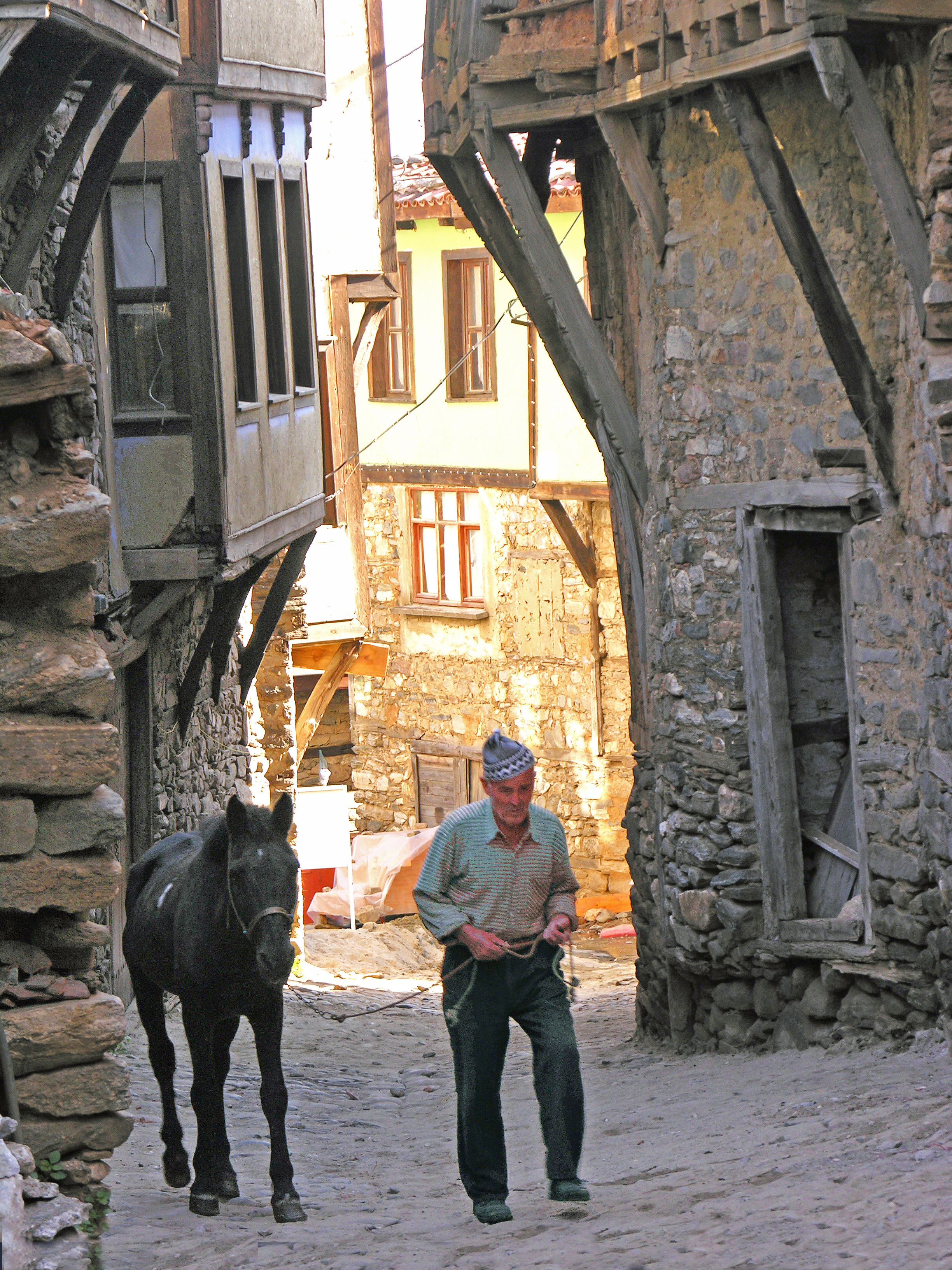 A man walking his horse, Cumalikizik Village, Turkey